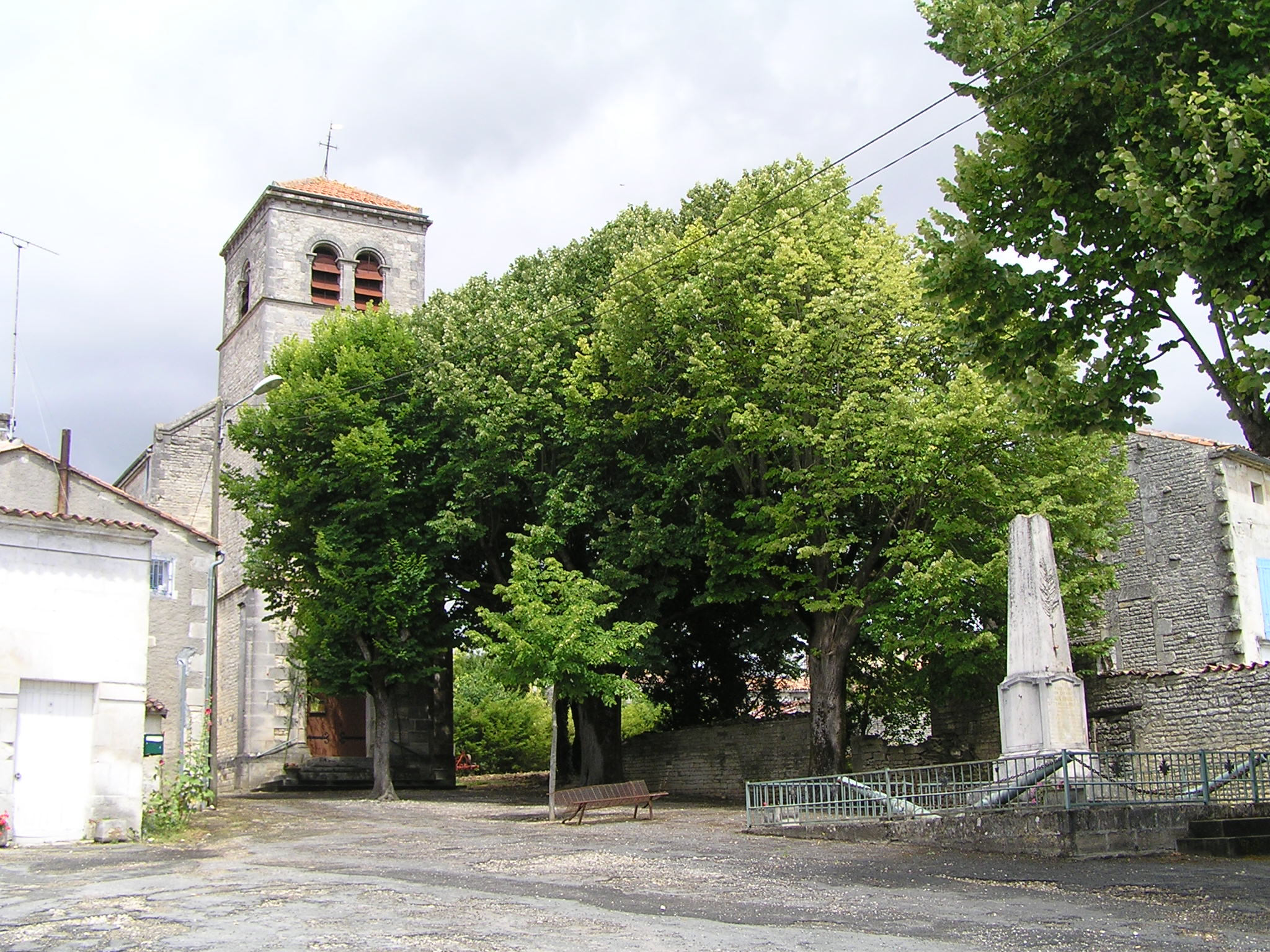 église de Vaux-Rouillac, Charente, France